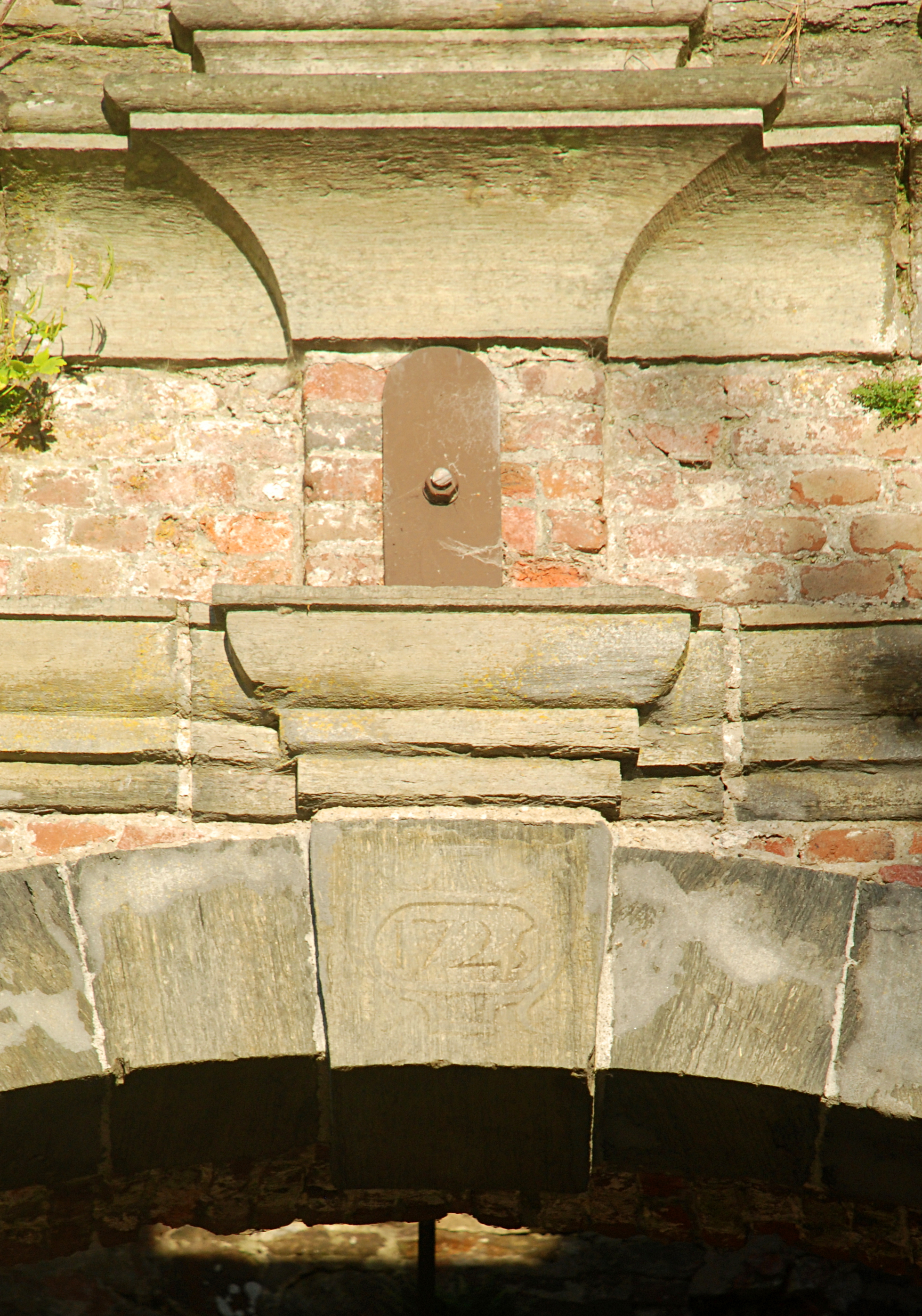 Belgique - Brabant wallon - Villers-la-Ville - Porte de Namur